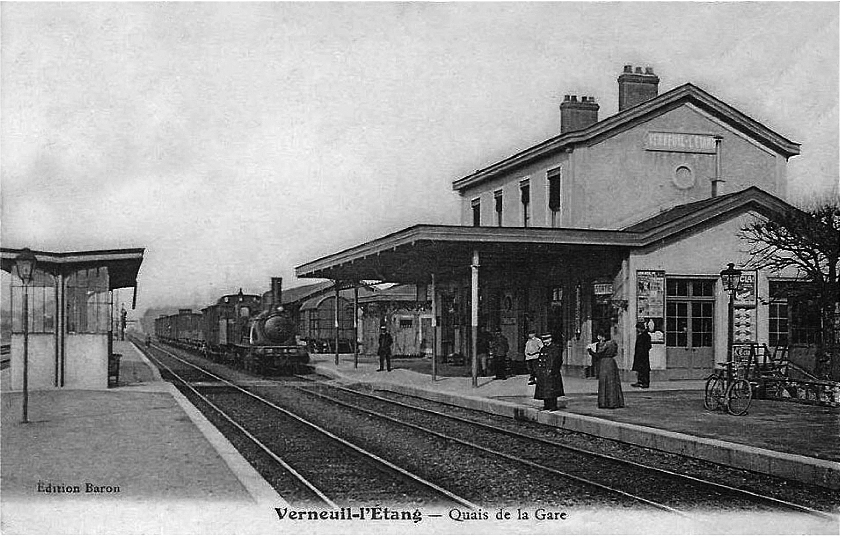 Intérieur de la gare de Verneuil-l'Étang avec l'arrivée d'un train tracté par une locomotive à vapeur, vers le début des années 1900.